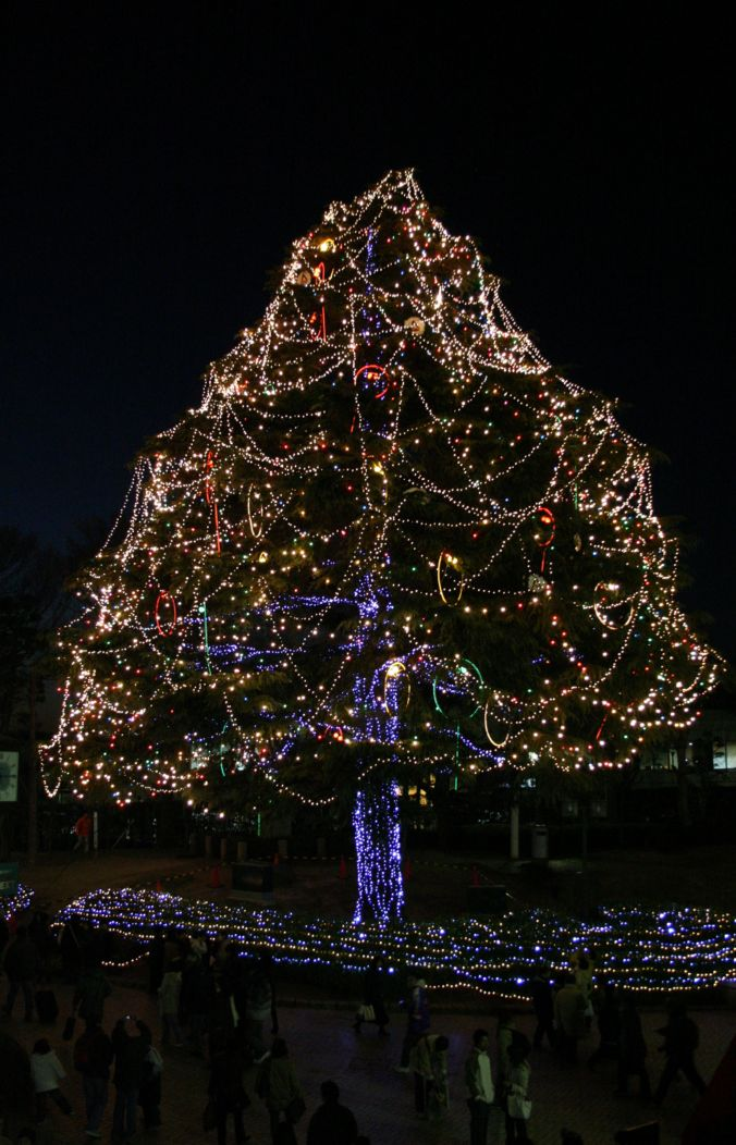 中山競馬場のヒマラヤスギ（2005年12月25日撮影）